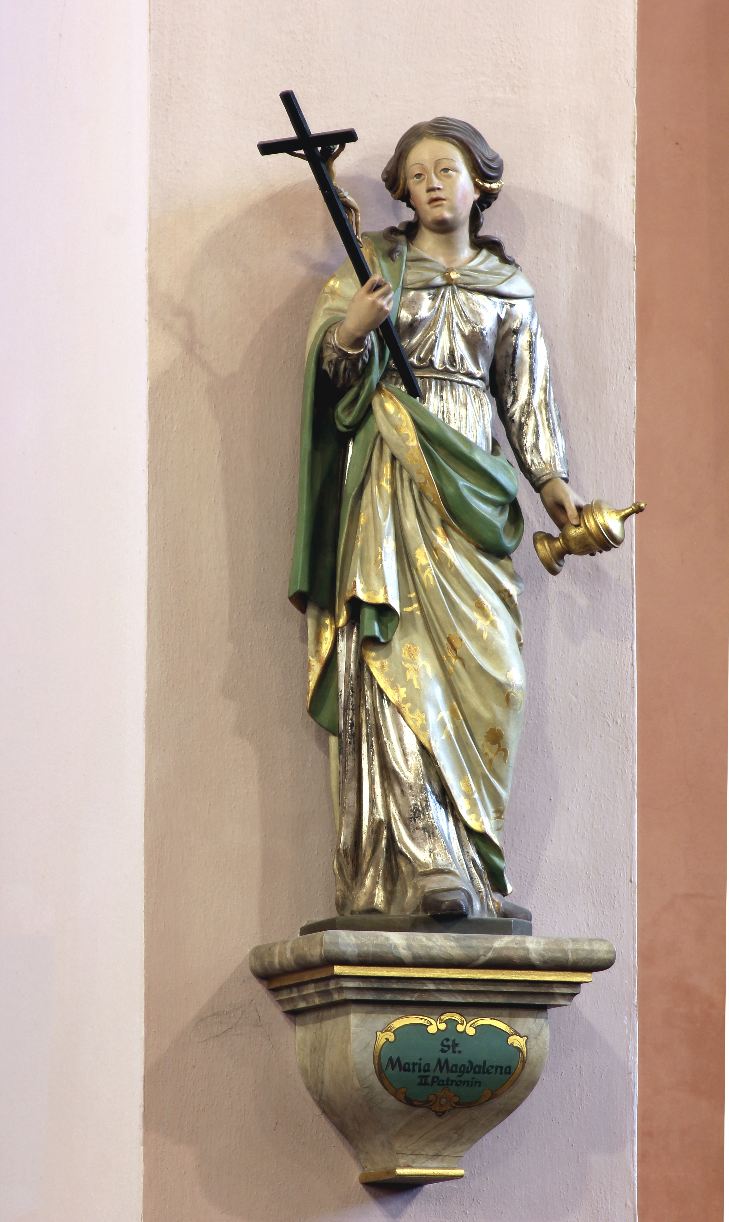 Maria Magdalena, Statue aus der Zeit um 1730 in der Pfarrkirche St. Mauritius Kärlich